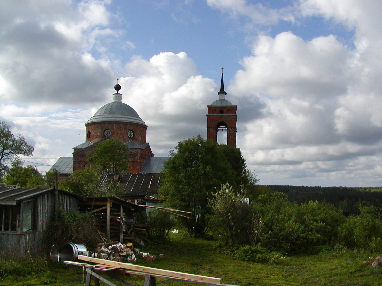 Вид на Троицкую церковь из окна дома Николая Полисского. Село Никола-Ленивец.